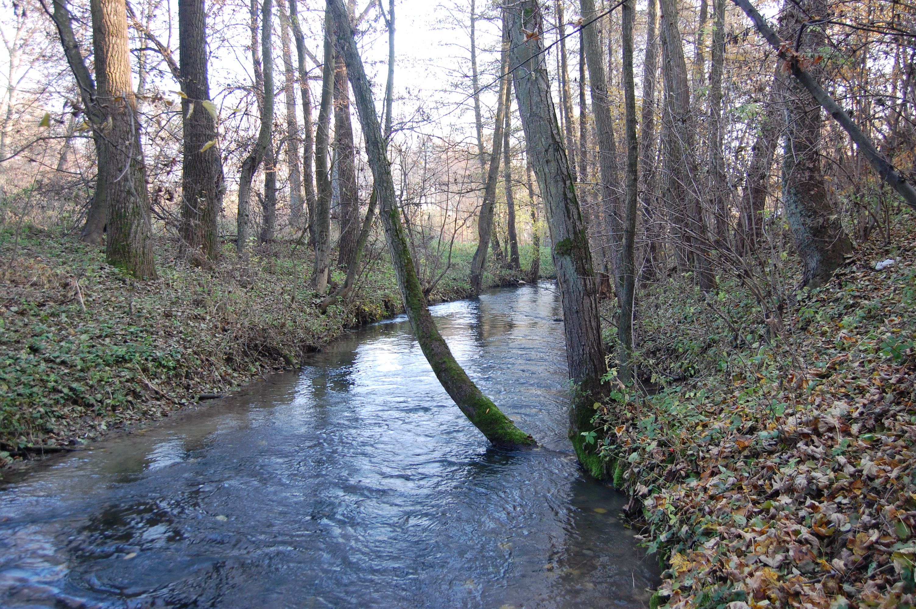 Rzeka Dłubnia w miejscowości Maszków woj.małopolskie